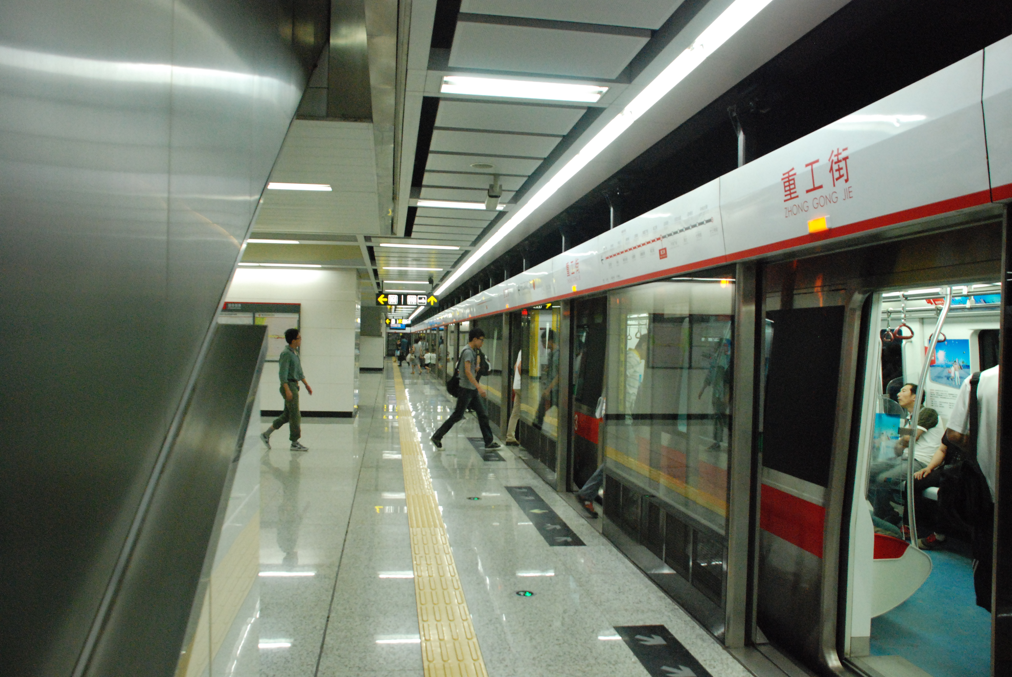 沈阳地铁一号线重工街站